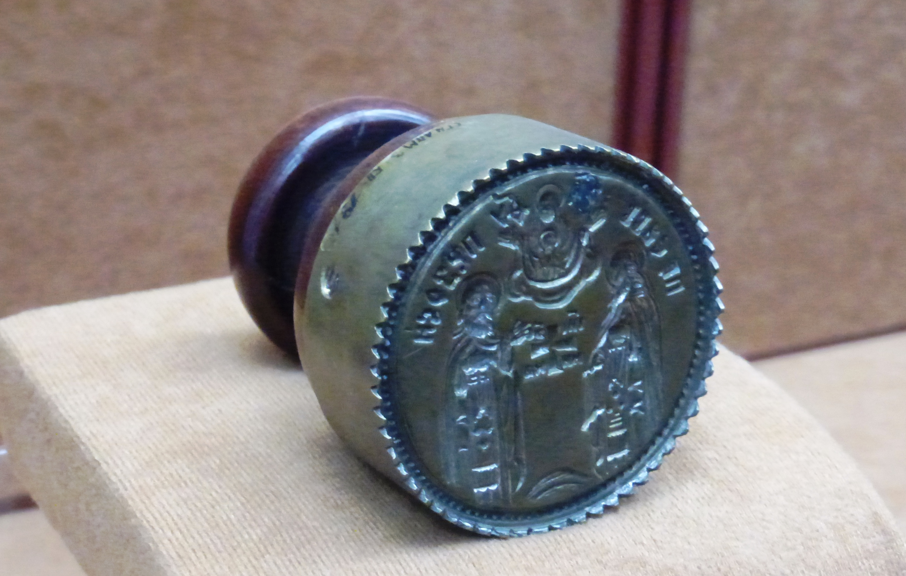 Просфорная печать (XIX век, медный сплав и дерево) в музейной экспозиции Соловецкого монастыря